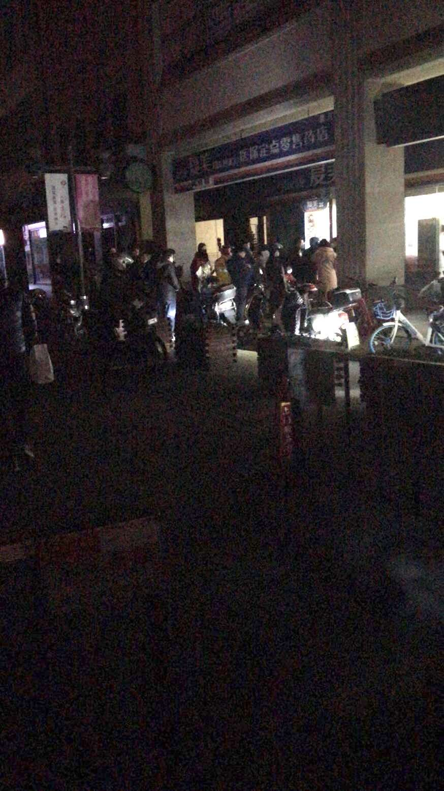 2020年1月31日，上海街頭排隊購買雙黃連口服液